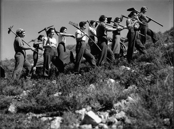 קרית ענבים - לעבודה! קבוצת "במעלה" ליד קרית ענבים.